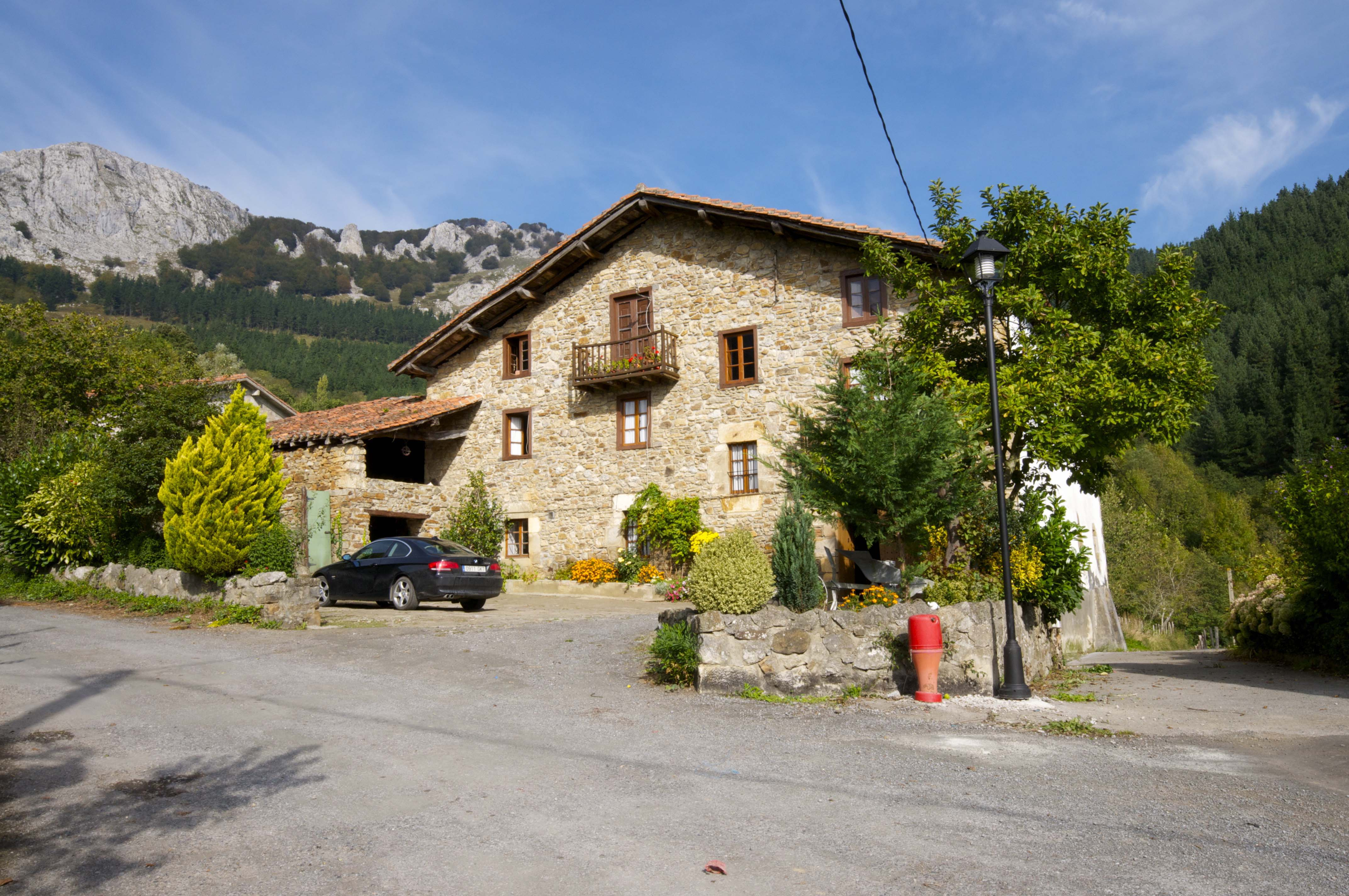 Caserío en Etxaguen